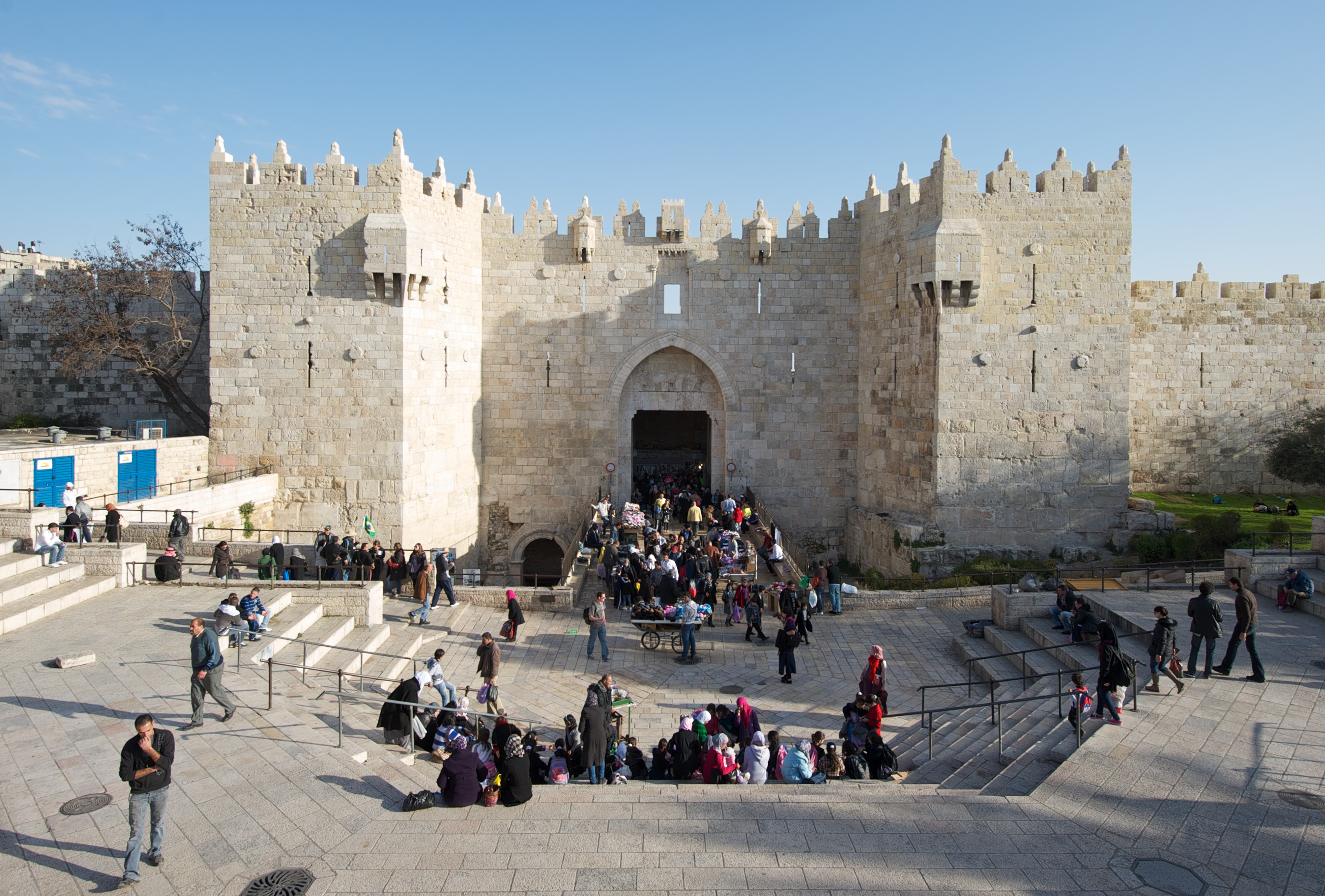 Damaskustur in Jerusalem